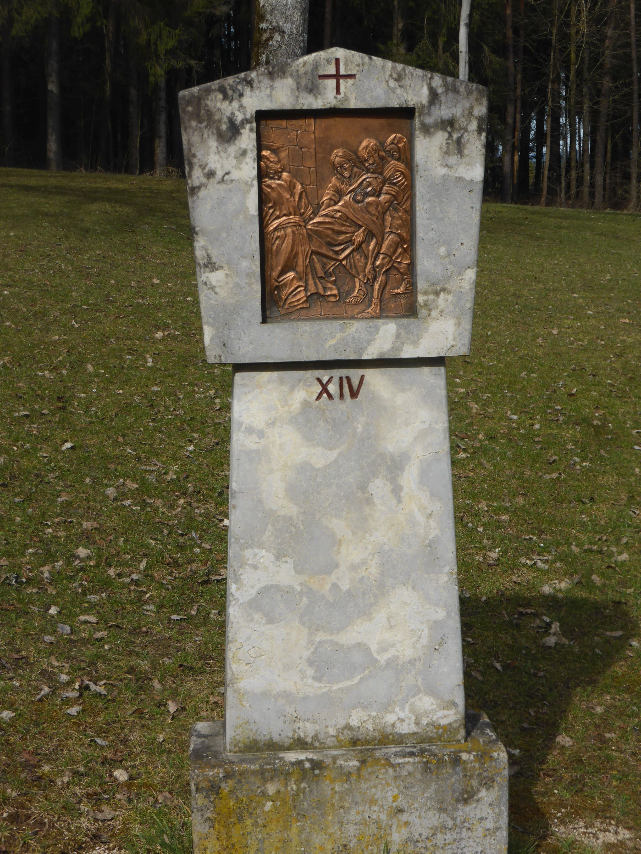 Kreuzweg zu Katholische Wallfahrtskirche St. Dionys und Nothelfer (Ensdorf)